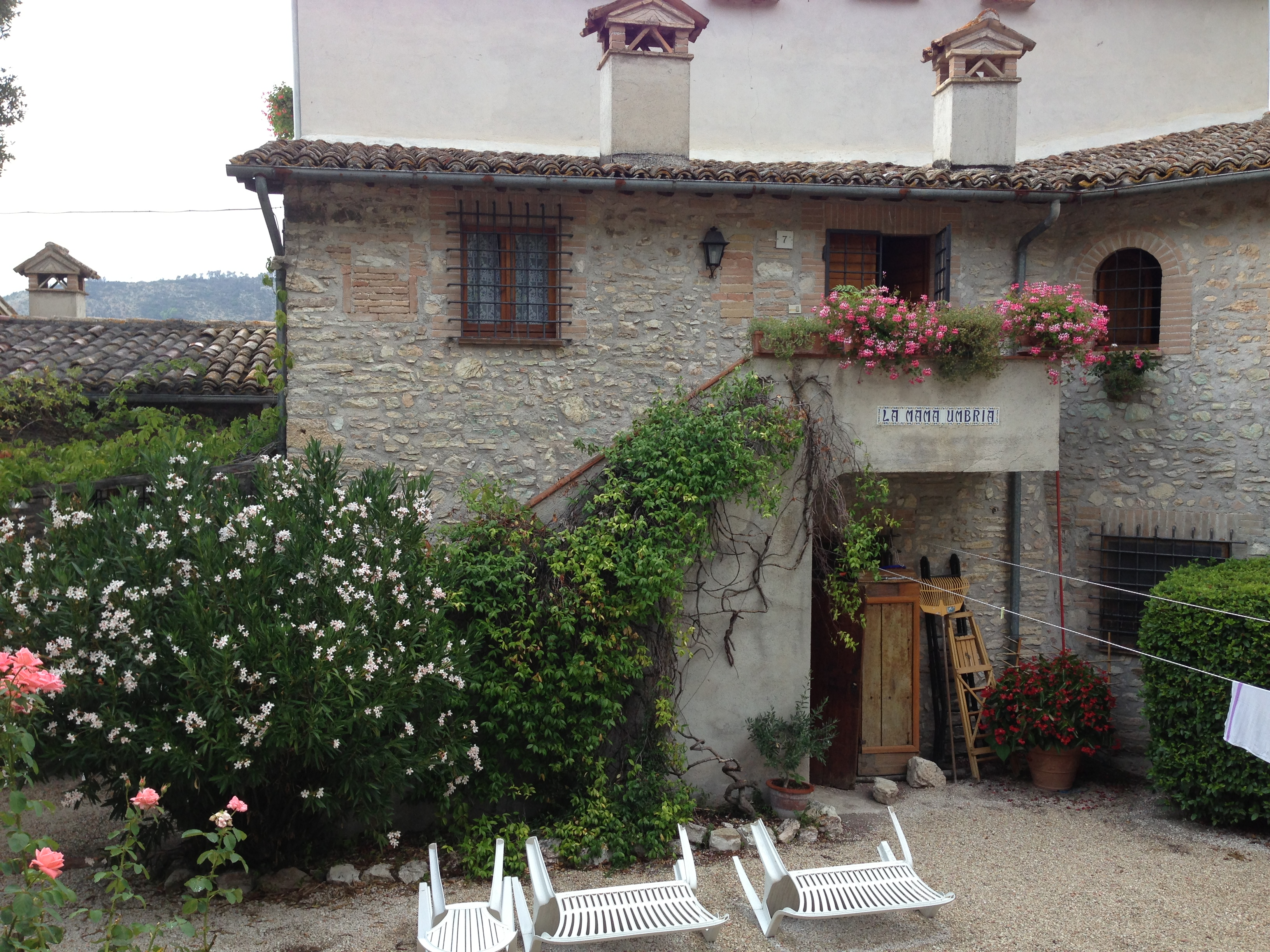 La MaMa Umbria - Santa Maria Reggiana, Spoleto - Ingresso principale